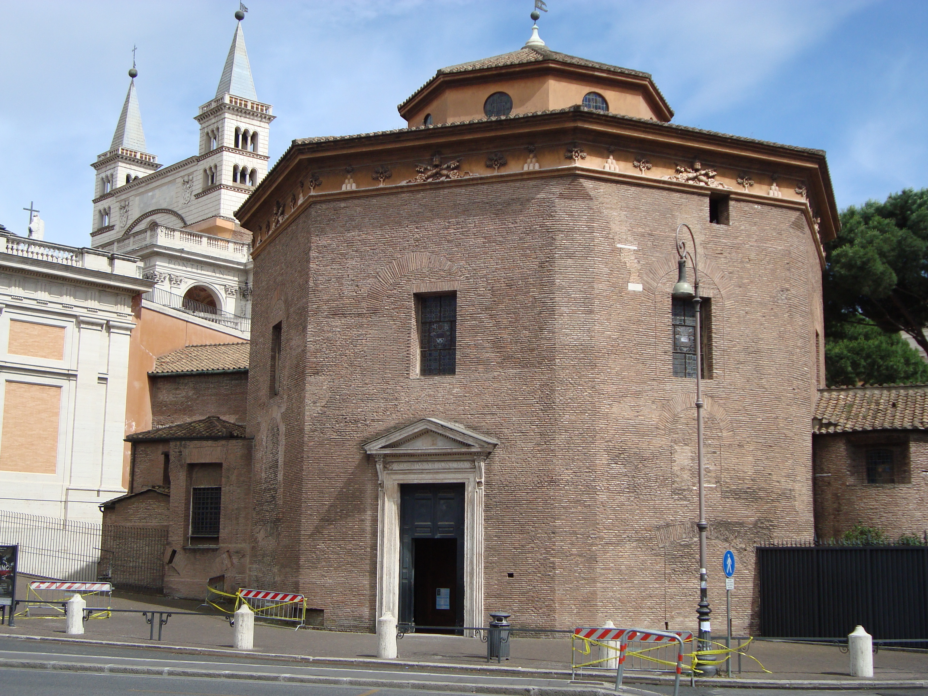 Baptistère Saint-Jean-du-Latran à Rome